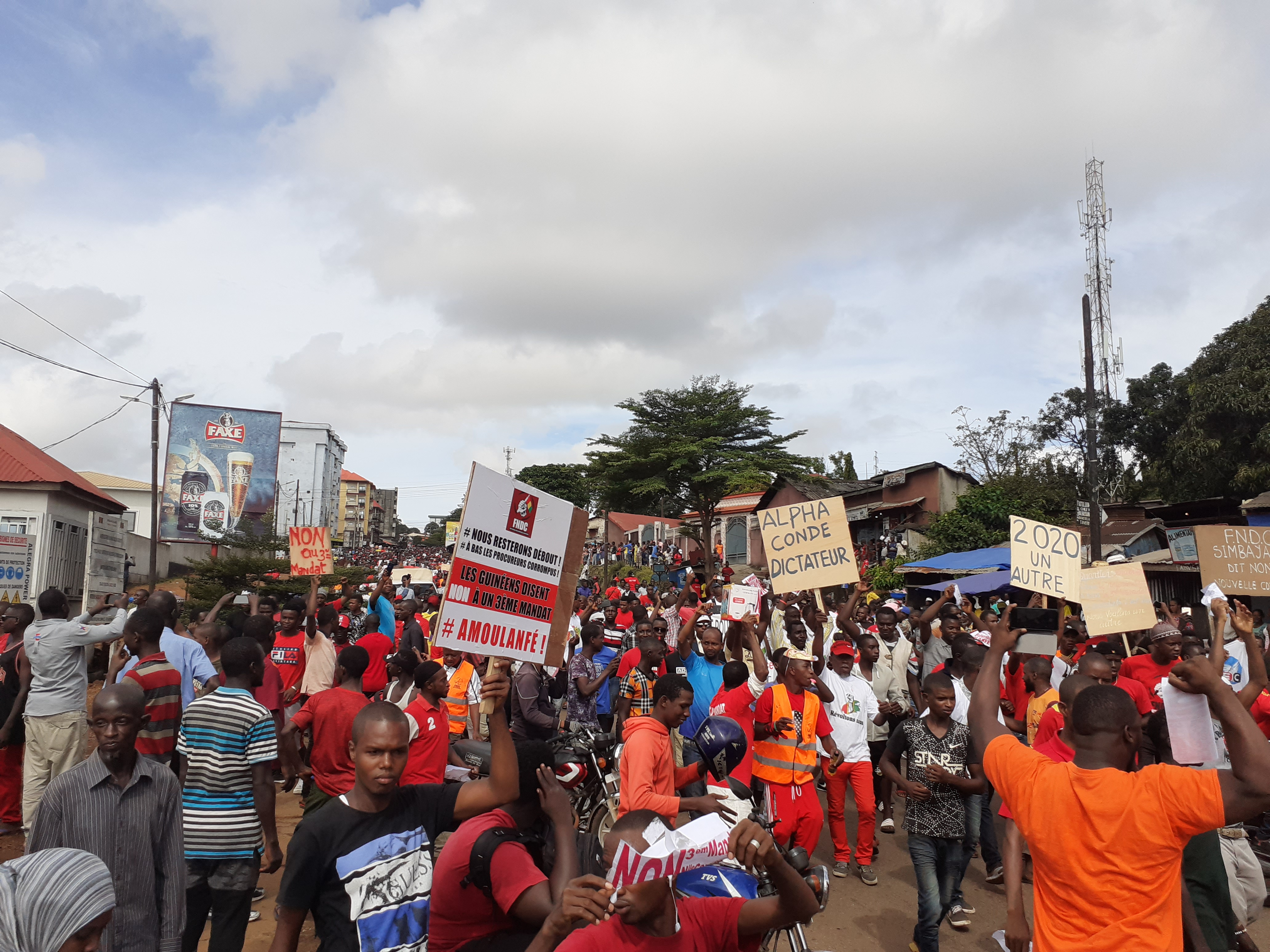 Depart de la manifestation du FNDC le 24 octobre à Conakry